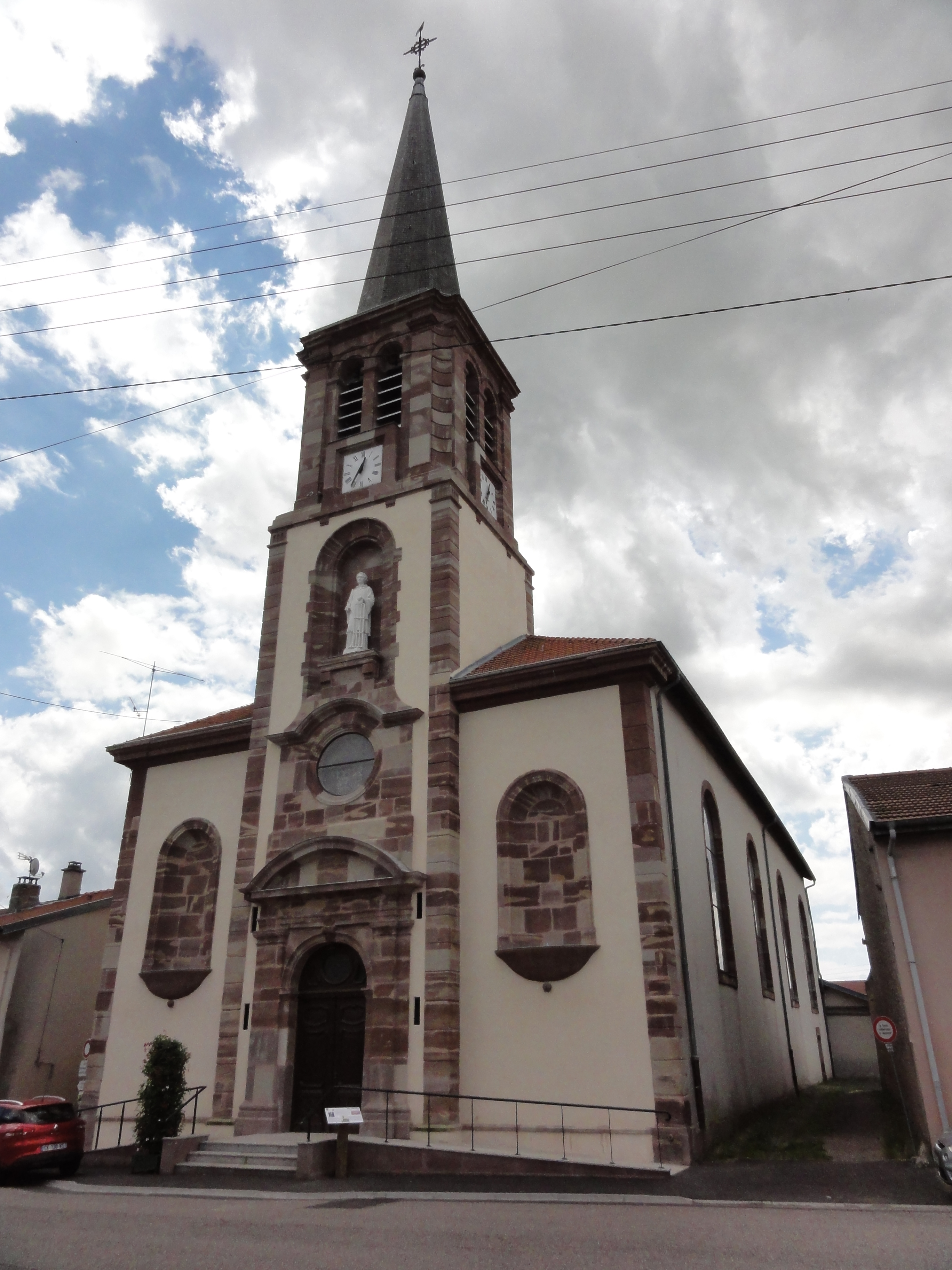 Einville-au-Jard (M-et-M) église Saint-Laurent